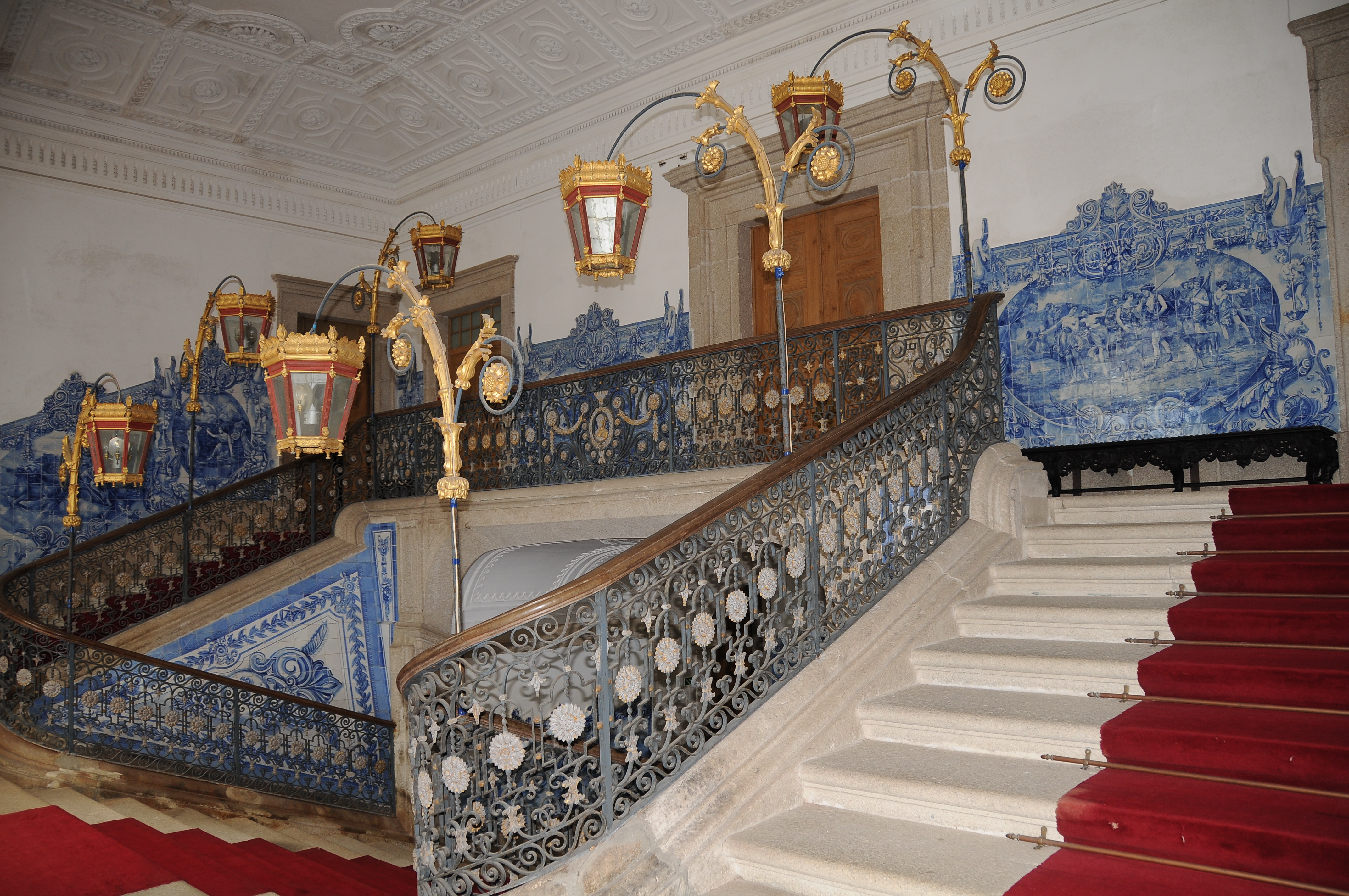 Main Stairs in Brejoeira Palace in Monção Portugal.